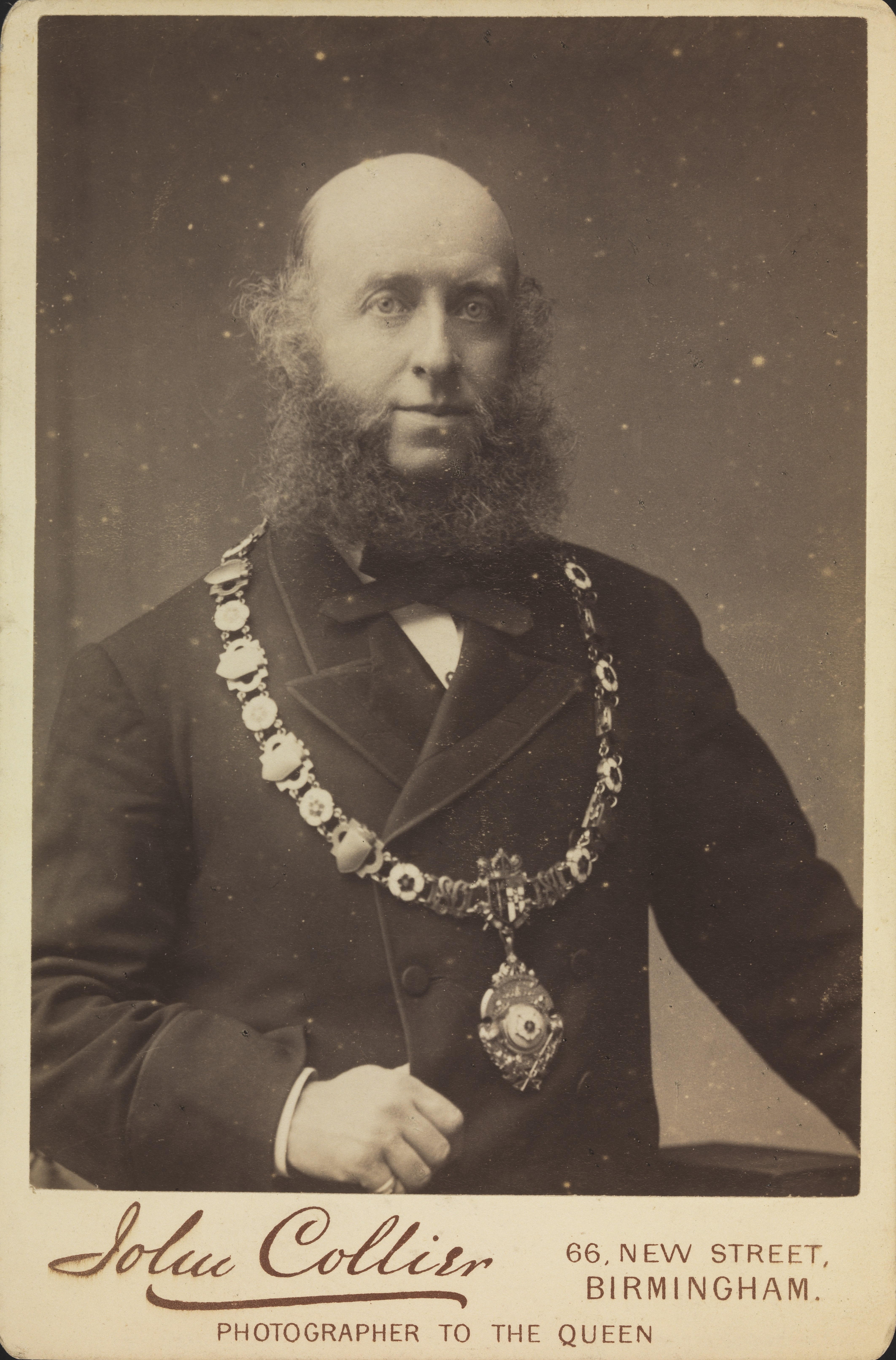 J.B. Stone, borgermester i Sutton Coldfield. Depicted person: Stone, J.B. Depicted place: Storbritannia, Birmingham